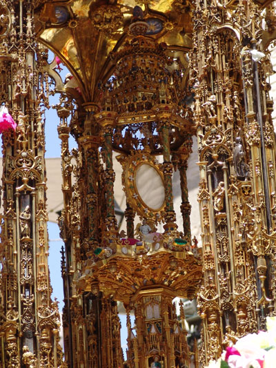 Custodia de la procesión